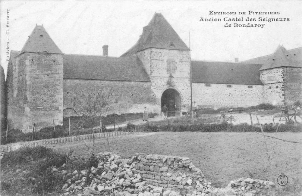 Carte postale représentant le manoir de la Taille ou château de Bondaroy, annotée "Environs de Pithiviers, ancien castel des seigneurs de Bondaroy", Loiret, Centre, France.